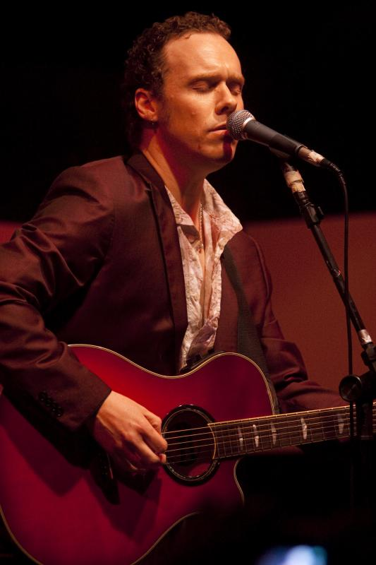 Anneke Van Giersbergen e Danny Cavanagh Live @ Blackmore Rock Bar - 05/06/2010 - São Paulo, Brasil É proibida a cópia ou reprodução deste material sem a autorização do autor. Por favor, não publique nada daqui sem o devido crédito. Fotógrafo: Alexandre Cardoso